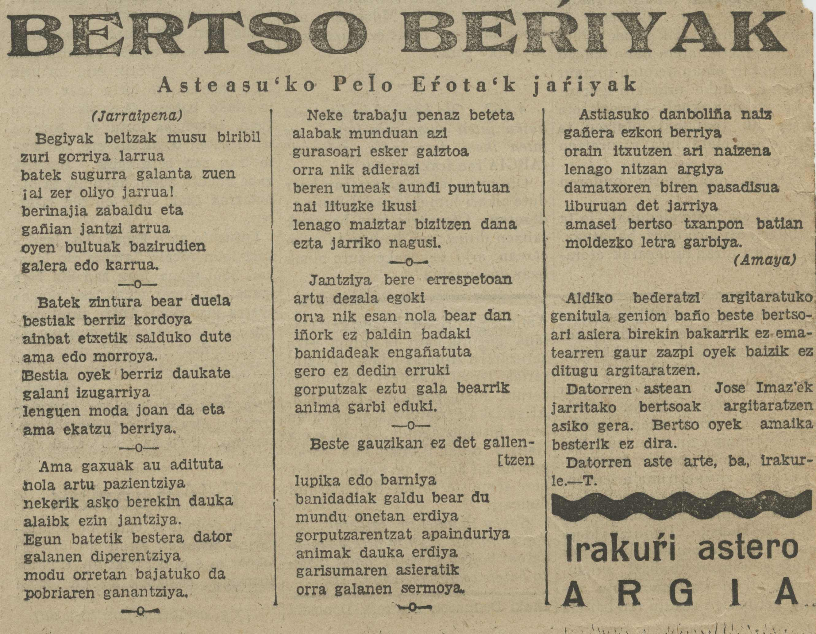 Argian argitaratutako bertsoak